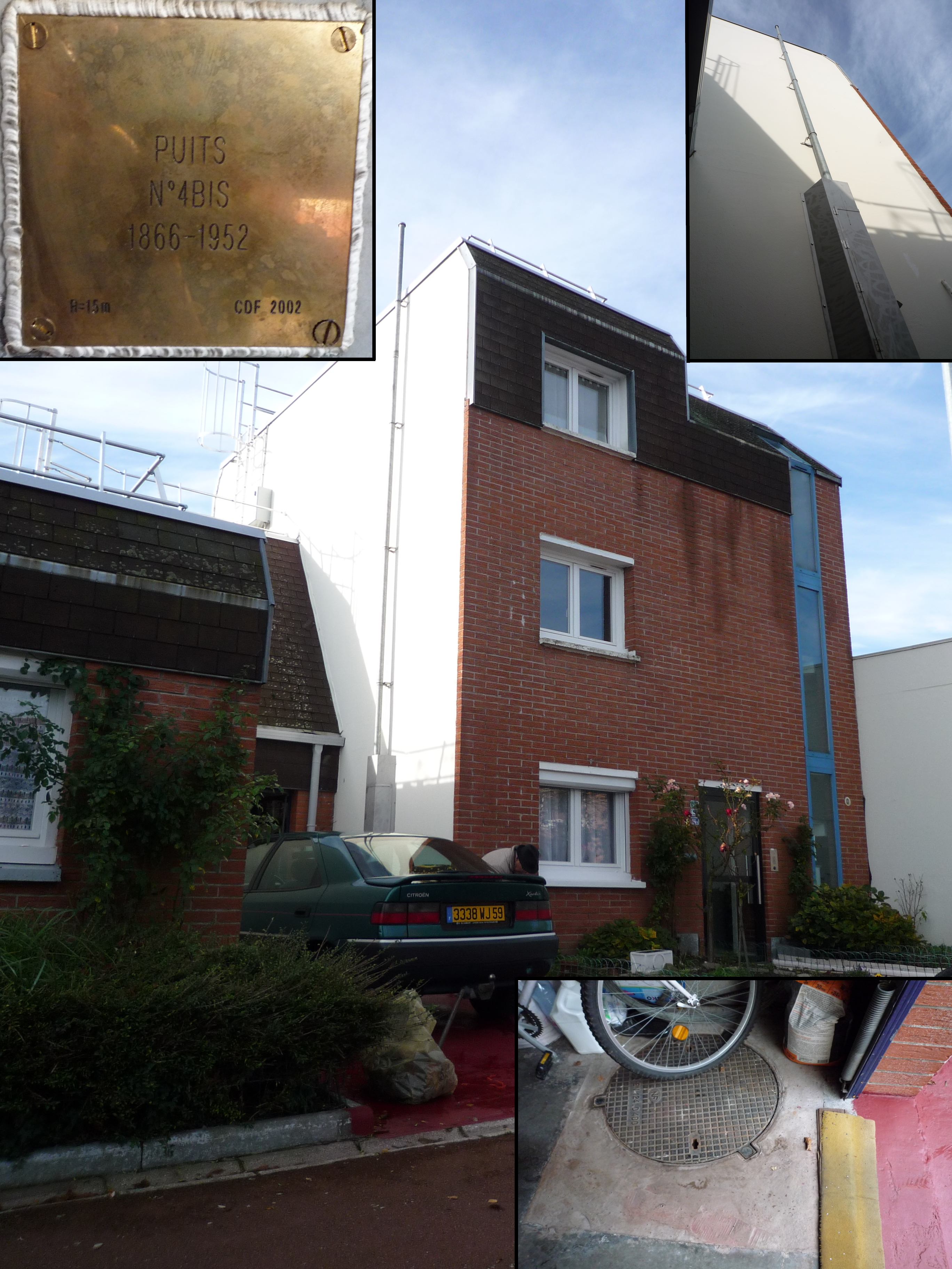 La Fosse n° 4 - 4 bis de la Compagnie des mines de l'Escarpelle était un charbonnage constitué de deux puits situé à Douai (Dorignies), Nord, Nord-Pas-de-Calais, France.